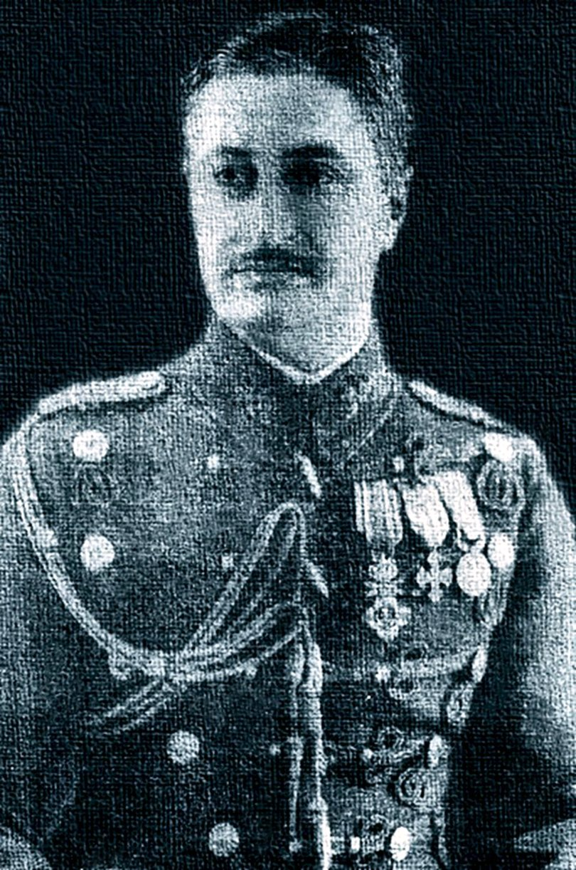 Aurel Racovitza als Oberstleutnant 1928